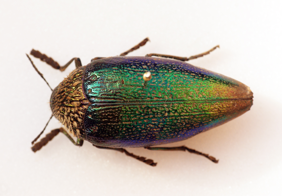 Buprestidae - In collection